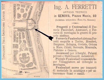 Depliant promozionale Alessandro Ferretti